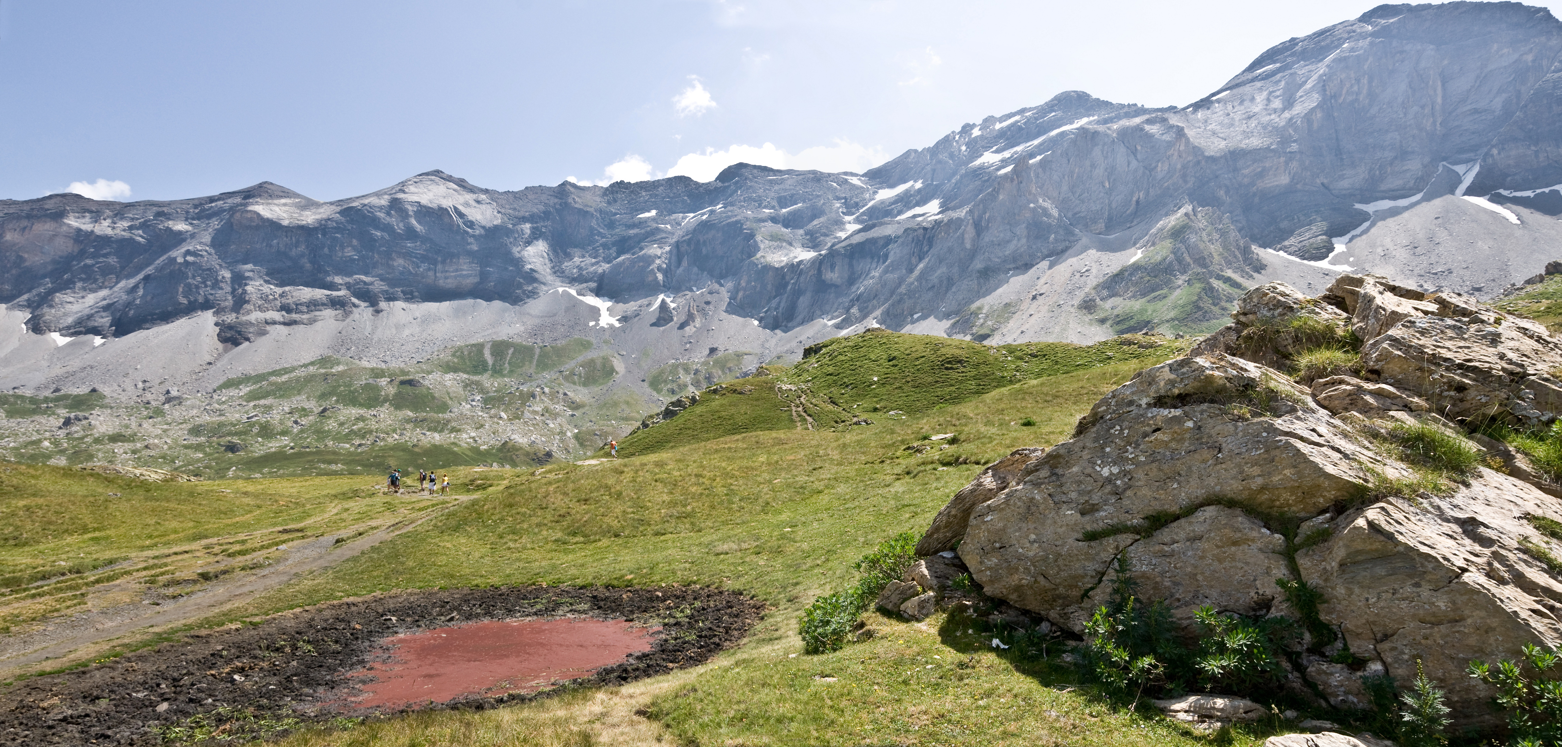 Cirque de Troumouse - Hautes Pyrénées - France